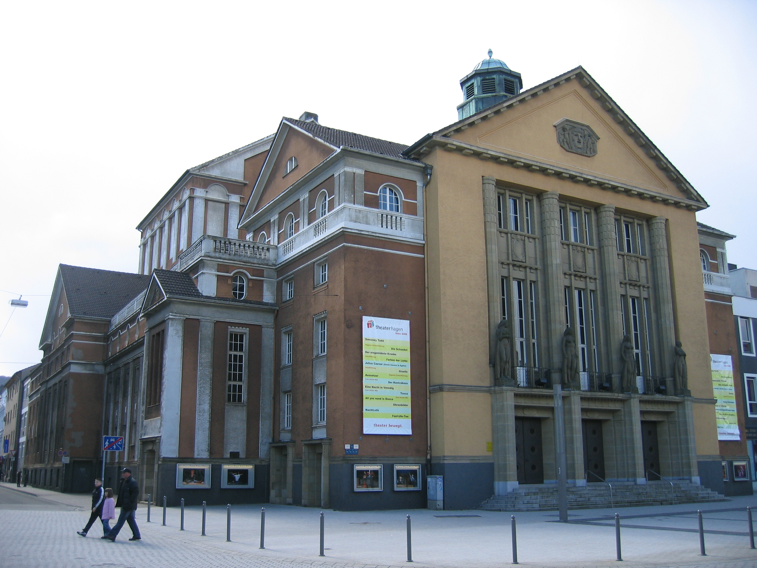 Das Stadttheater in Hagen This is a photograph of an architectural monument.